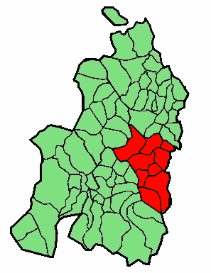 aipaturiko eskualdearen kokapena Nafarroa Beherean